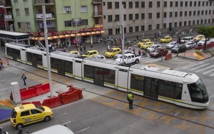 Integrado al sistema Metro De Medellín